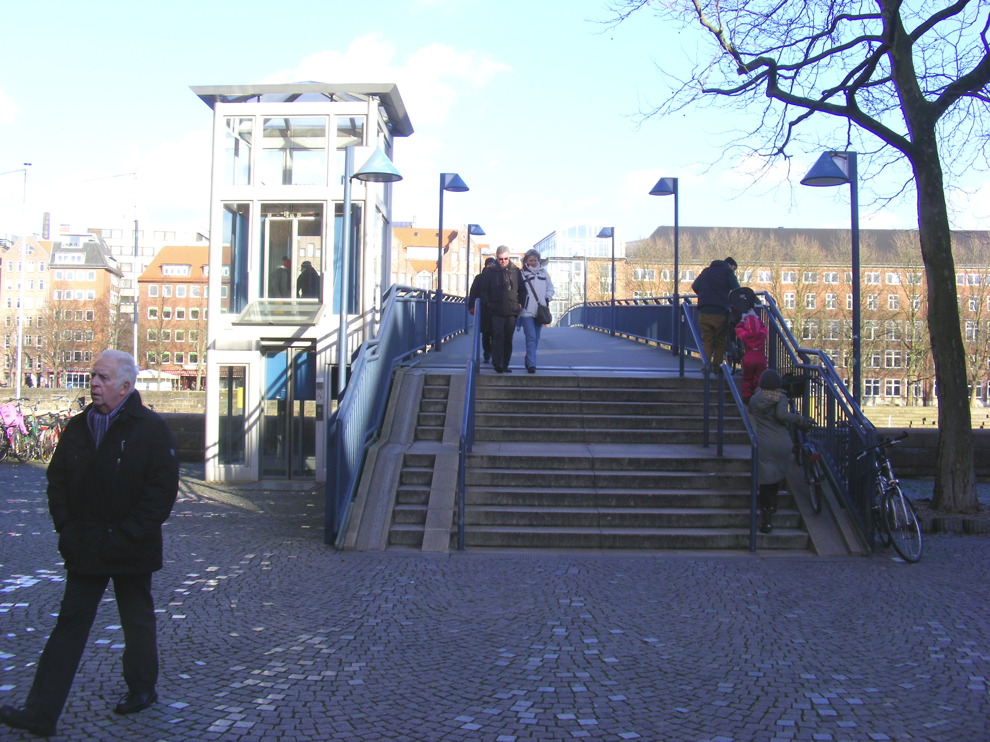 Durch den erhöhten Einbau der Teerhofbrücke 1993 wurde die Chance zu einer brauchbaren autofreien Fahrradverbindung zwischen Bremer Alt- und Neustadt vertan. Immerhin gibt es Schieberampen für die Fahrräder.